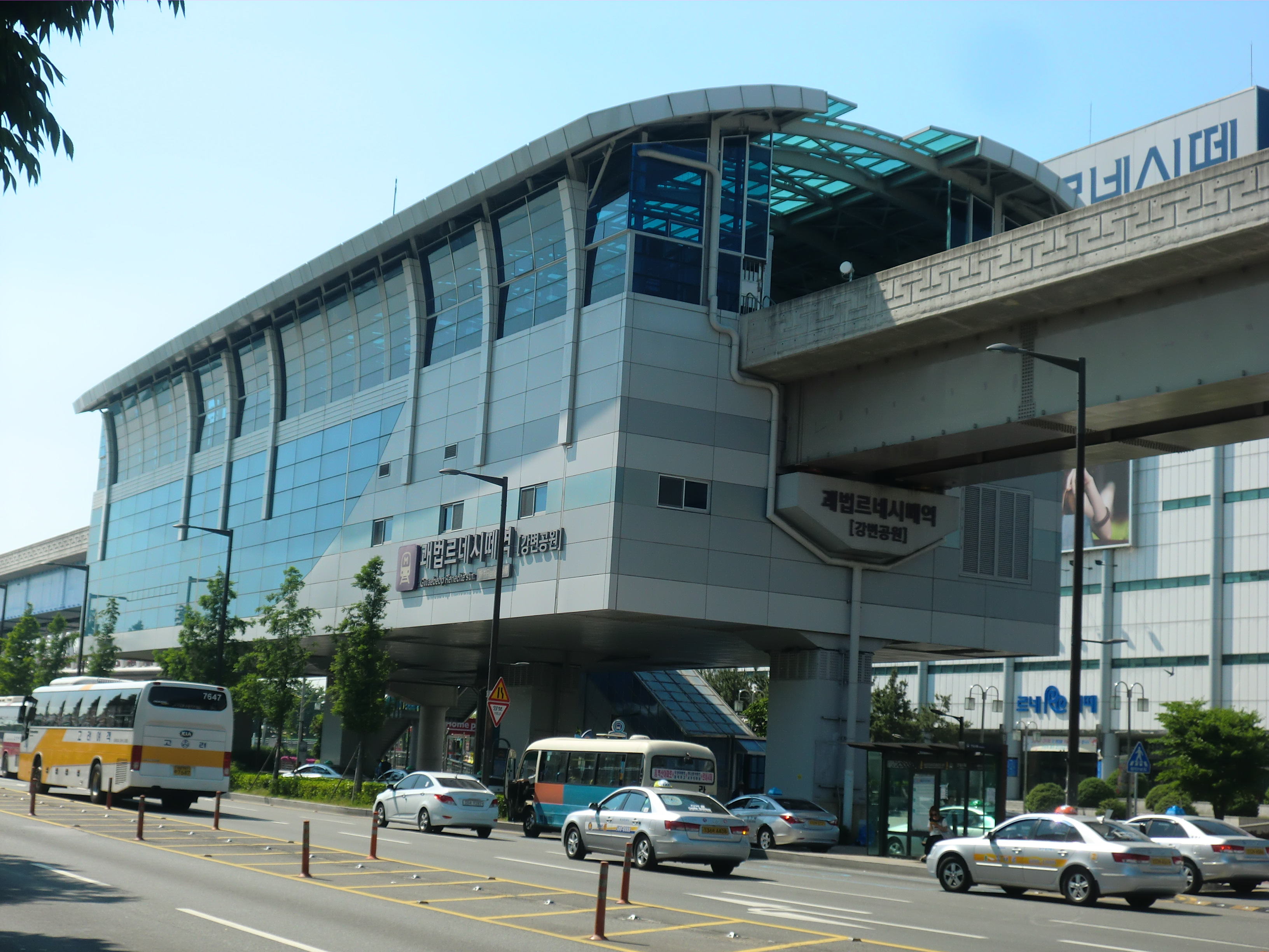 부산-김해경전철 괘법르네시떼역